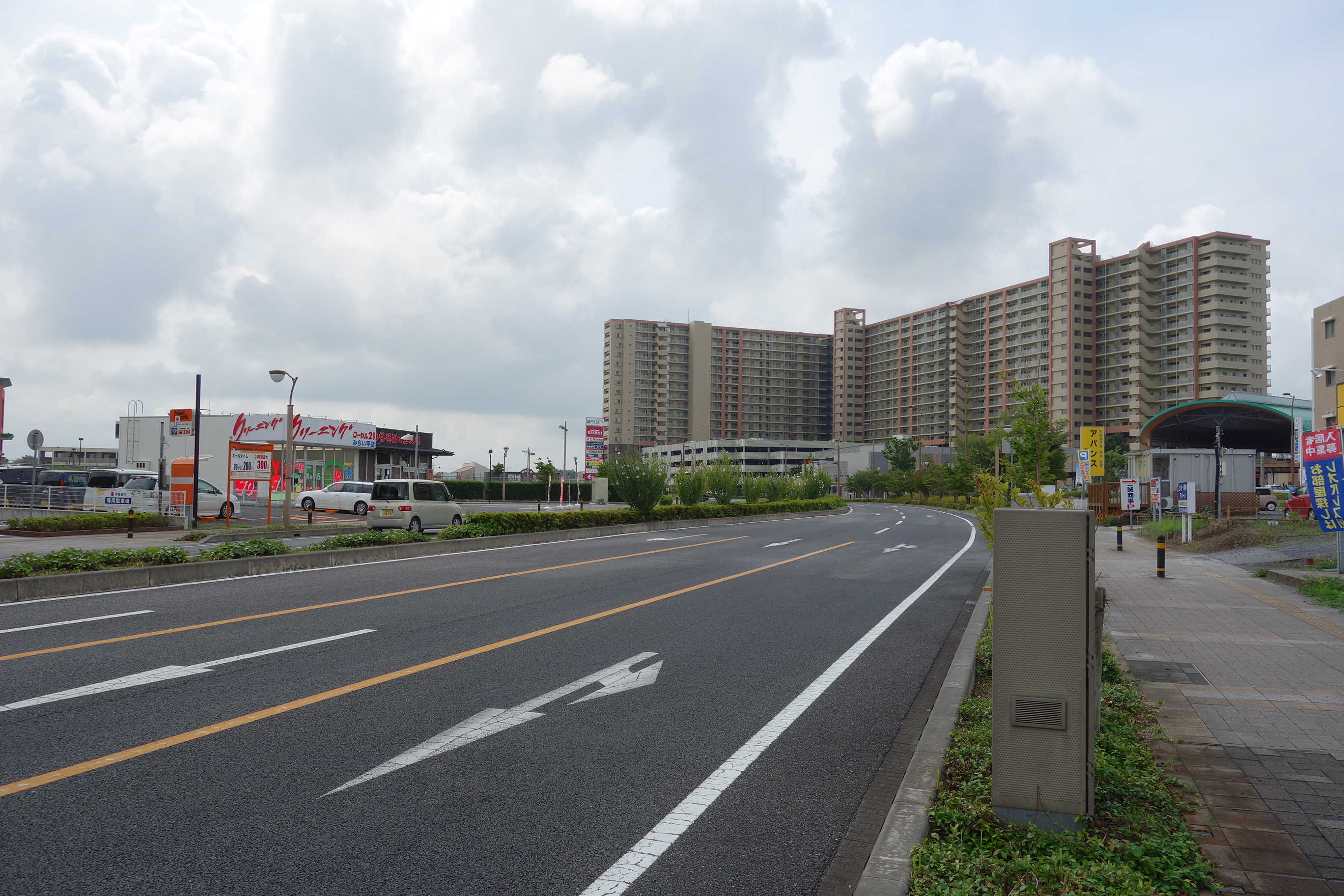 TXみらいだいら駅付近